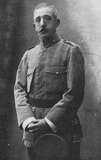 Retrato de Luis Aizpuru y Mondéjar.